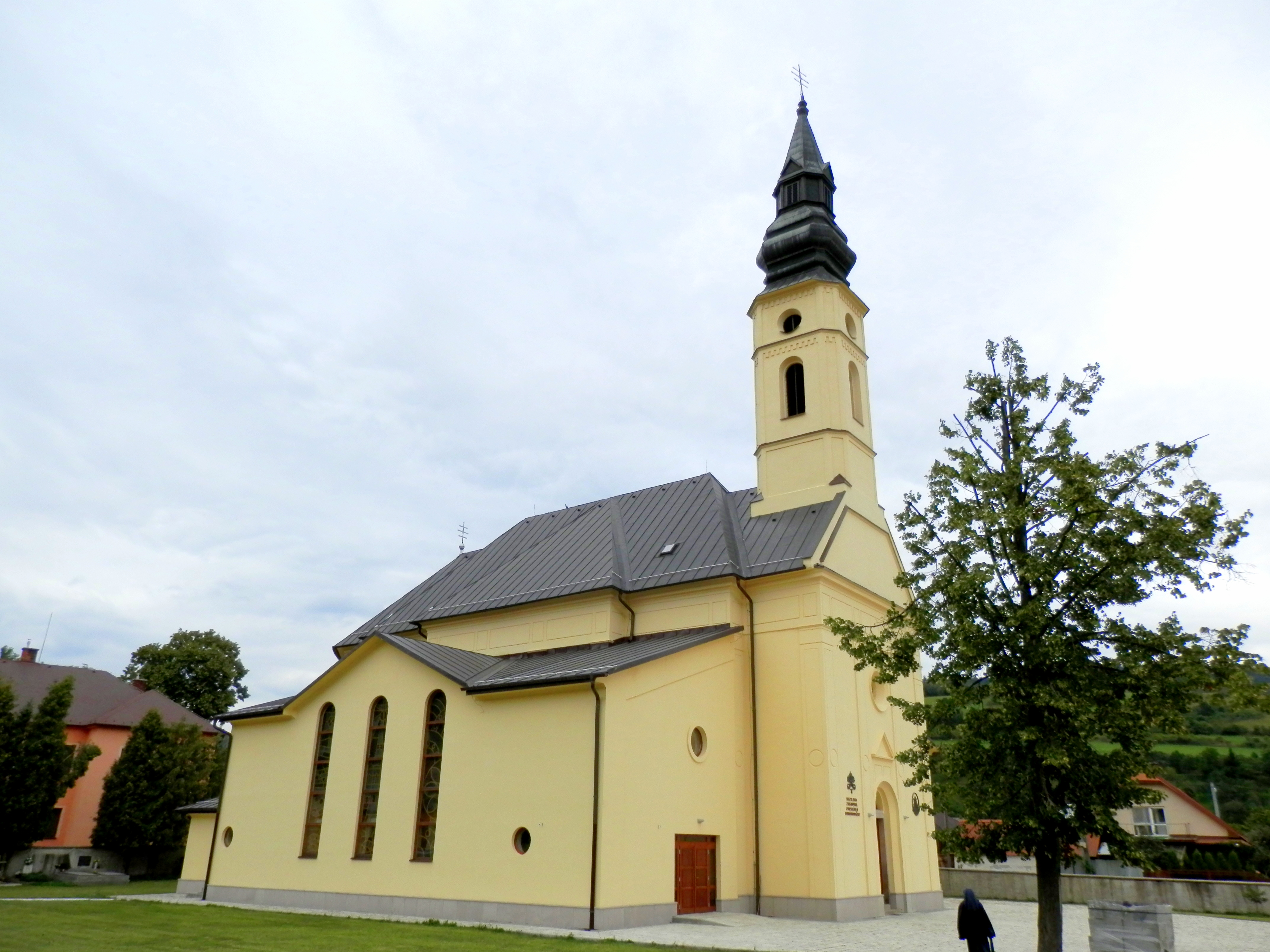 Bazilika v obci Ľutina okres Sabinov